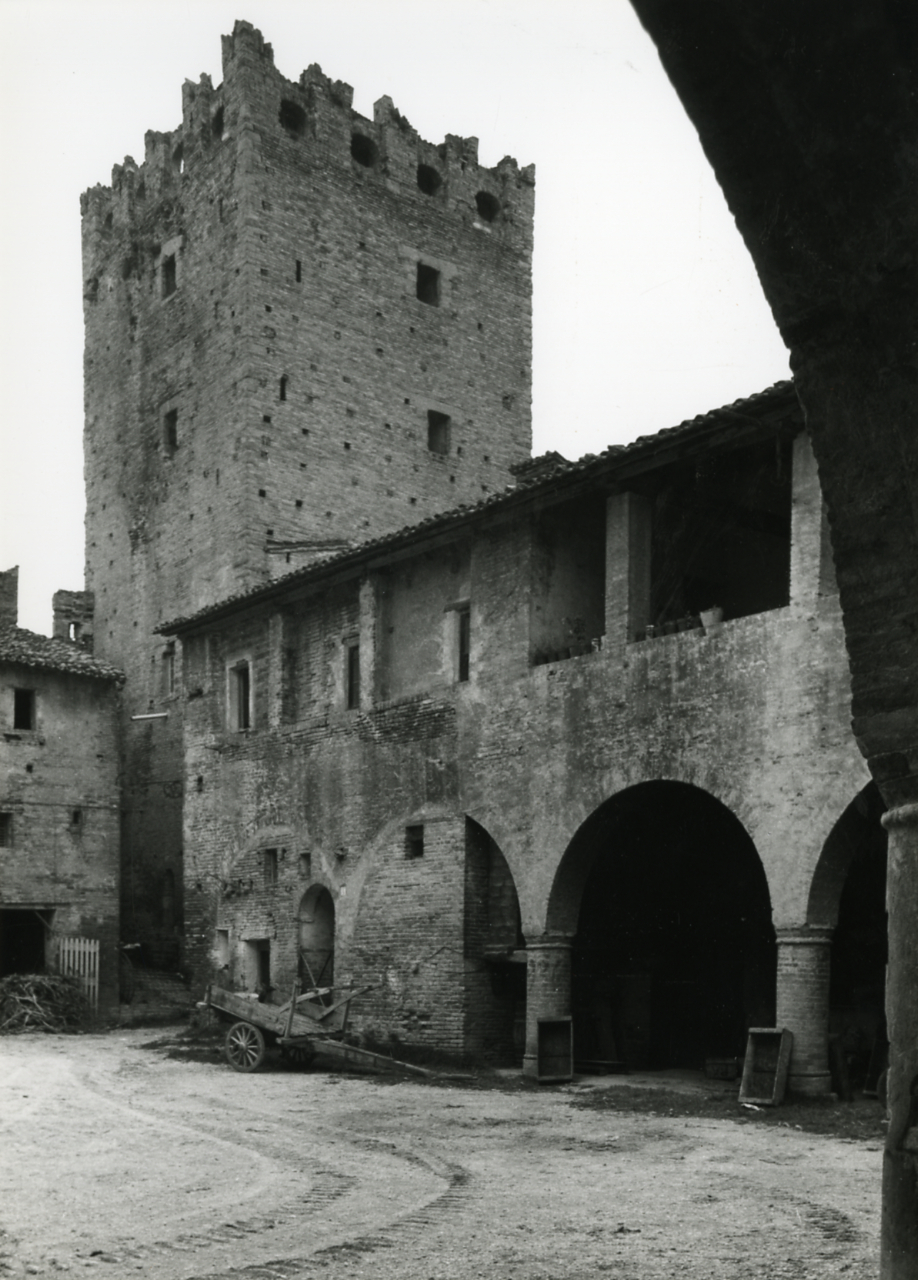 Tolentino. Castello di Rancia. Ingresso principale con ponte in muratura. Cortile interno con vista della torre angolare. Servizio fotografico : Tolentino, 1969 / Paolo Monti. - Stampe: 3 : Positivo b/n, gelatina bromuro d'argento/ carta, 24x30. - ((Al verso delle stampe manoscritti i numeri dei negativi corrispondenti (formato 35 mm) con indicazione del fotogramma: 895/21, 895/27, 895/34. - Sul coperchio della scatola iscrizione didascalica manoscritta a pennarello nero: "Architettura/ Castelli". - Occasione: Documentazione per la pubblicazione: Touring Club Italiano, "Marche", Milano, TCI, 1971. - Fonte: Agenda di Paolo Monti: Monti/ 3 aprile 1966 - 9 marzo 1971/ 12421-16823 (1966-1971), presso Archivio Paolo Monti. - Fonte: Monografia di Touring Club